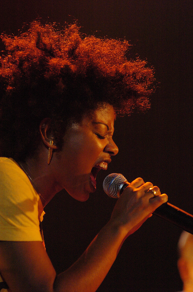 Thalma de Freitas durante o show de Apollo Nove. 23 de setembro de 2006. Auditório Ibirapuera. São Paulo. Brasil.